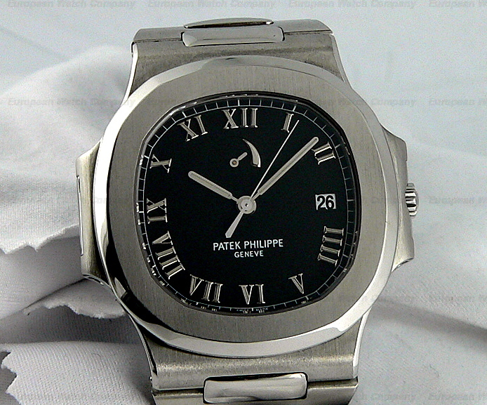 Ref. 3710 с индикатором запаса хода (сталь).